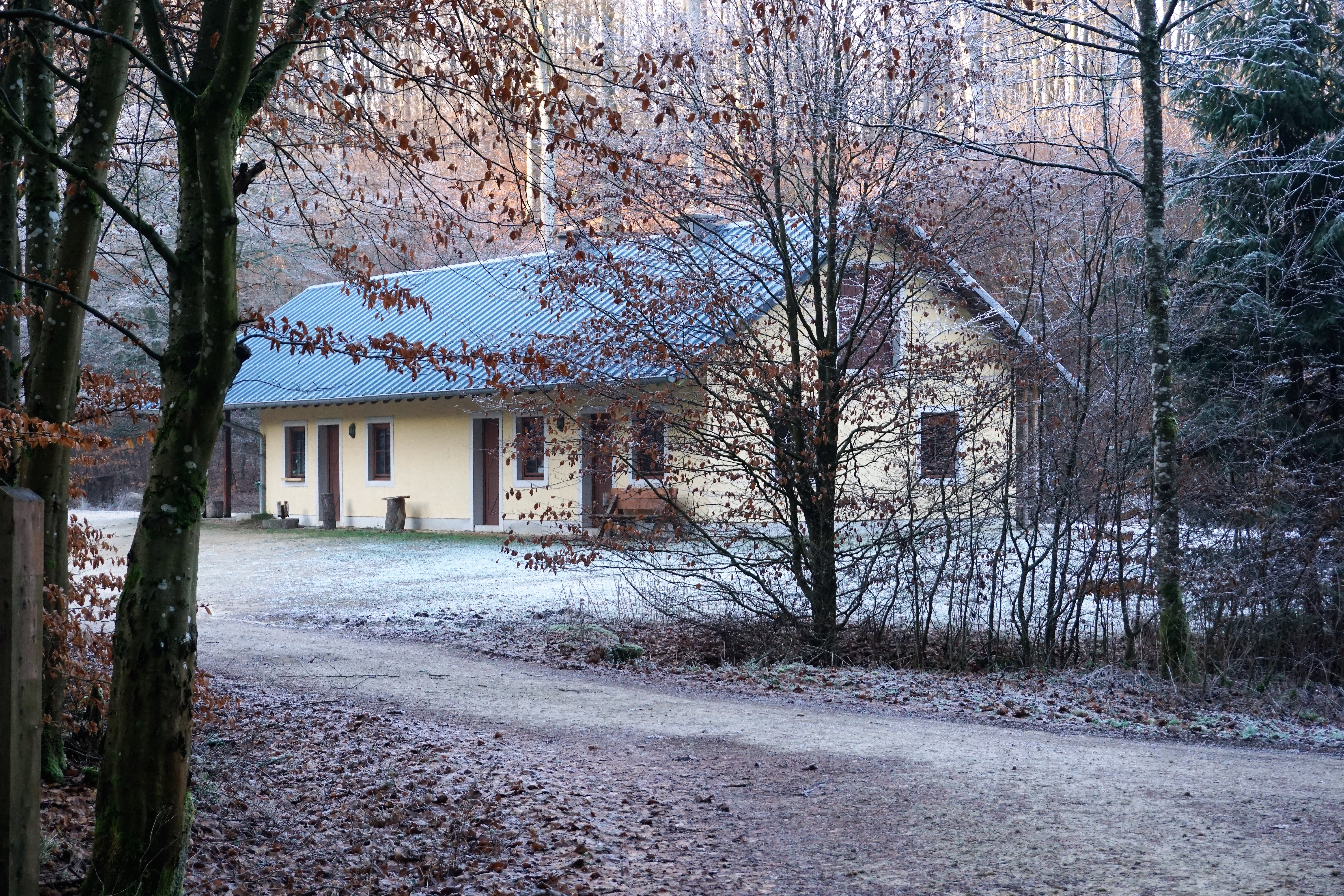 Grunewald, maison forestière près du Déiwendallerwee, commune de Steinsel.